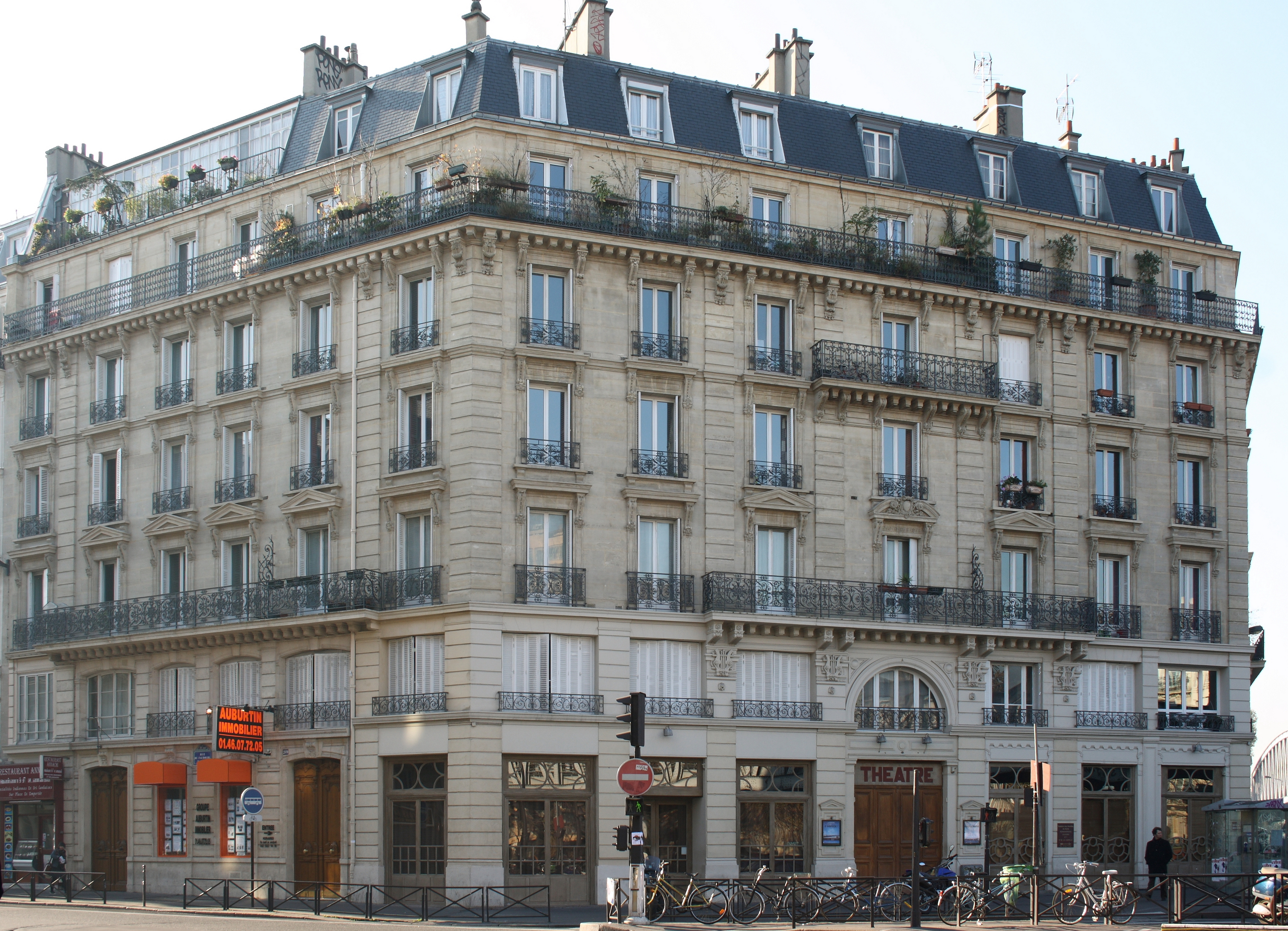 Théâtre des Bouffes du Nord, 37bis, Boulevard de la Chapelle im 10. Arrondissement von Paris